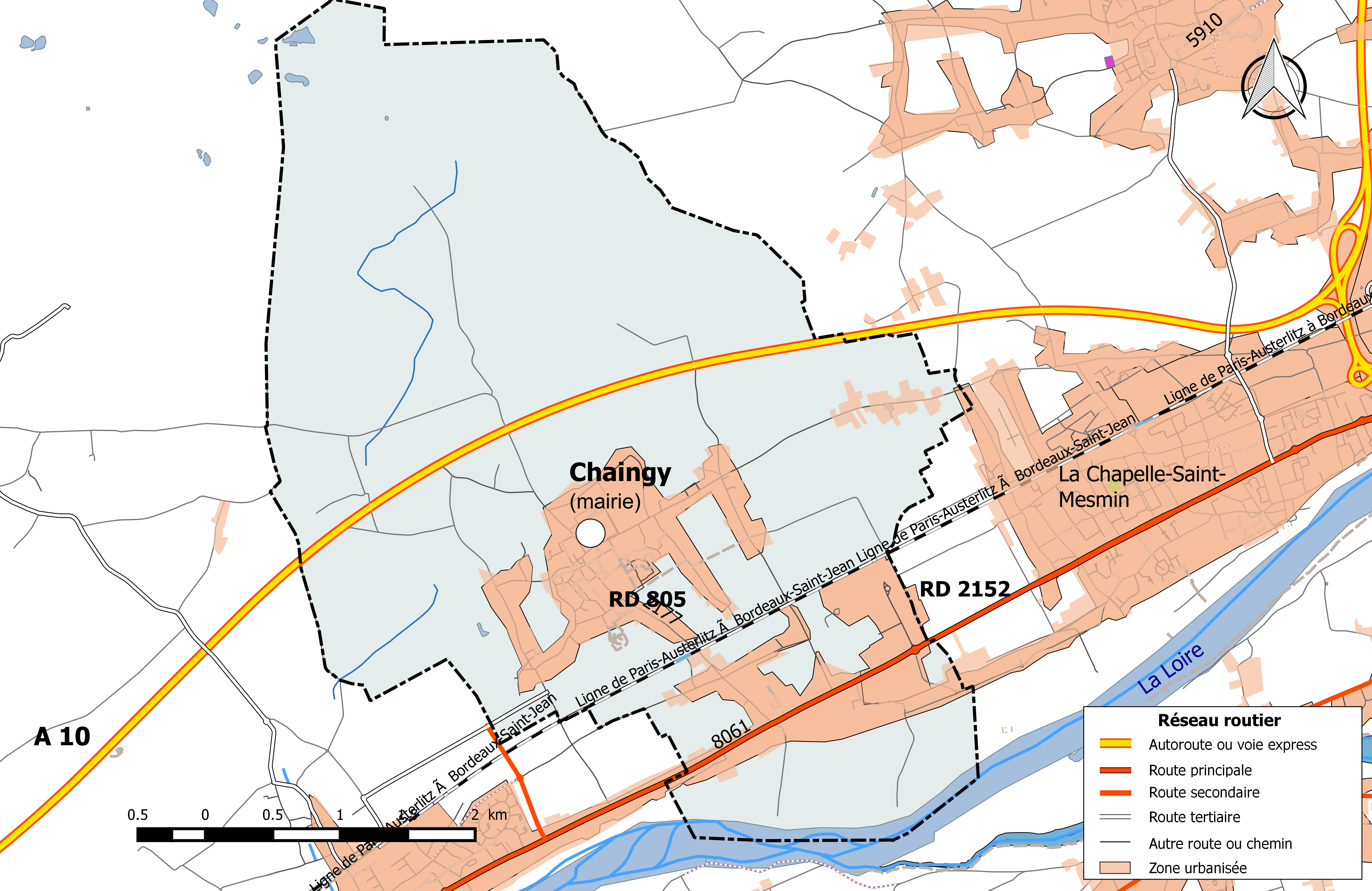 Carte du réseau routier de la commune de Chaingy.